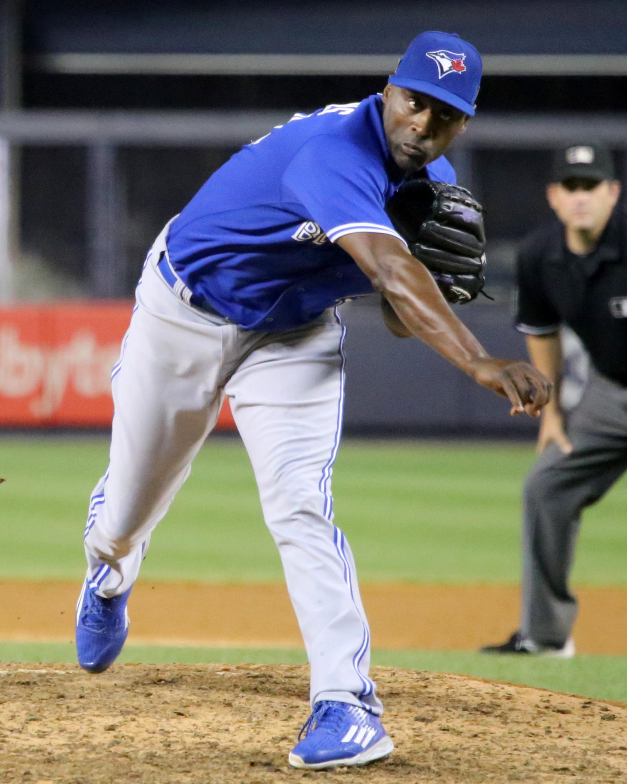 LaTroy Hawkins